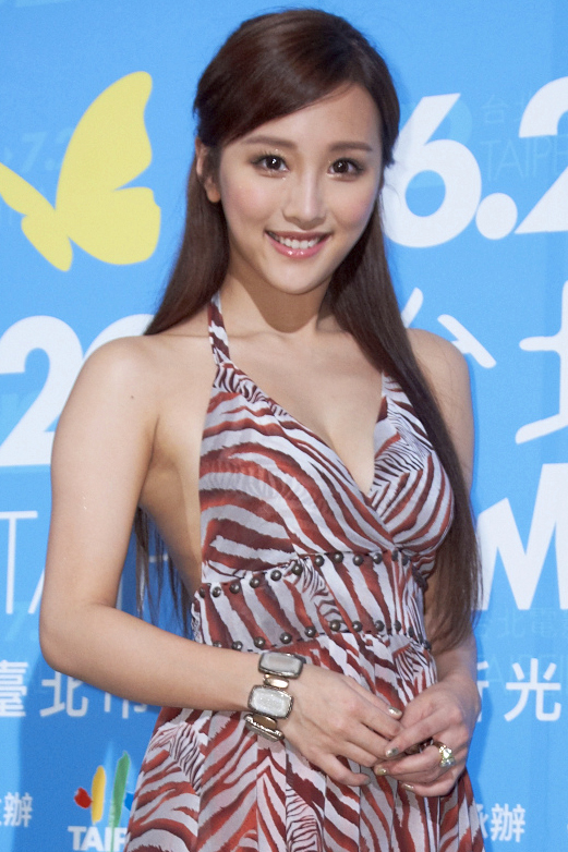 香港電影演員陳靜